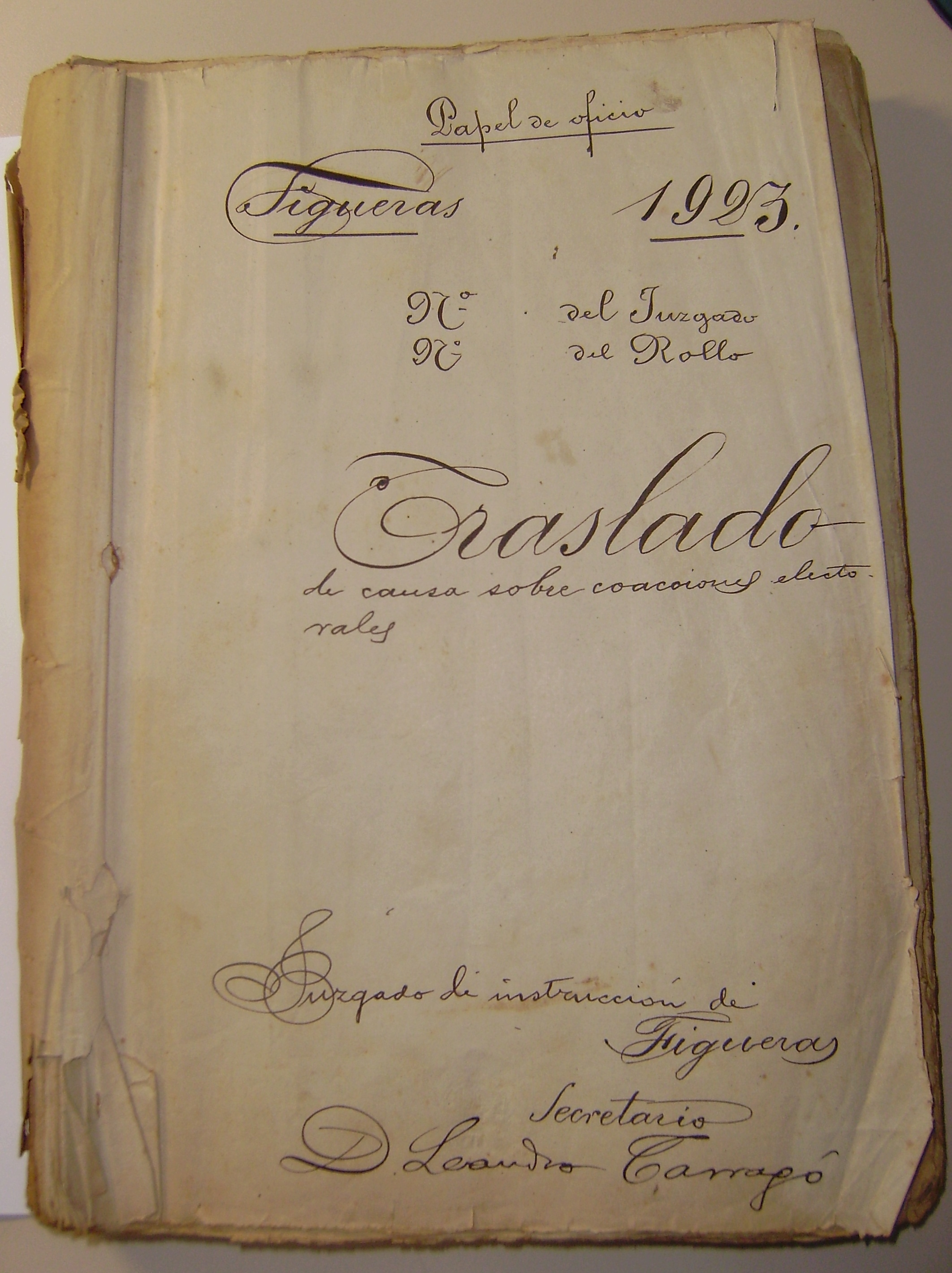 Els expedients generats pel despatx del procurador de tribunals figuerenc Tomàs Jou Barbosa i el seu fill Josep Jou Carreras sumen 3600 causes civils, des del 1892 en què inicià la seva activitat com a agent fiscal al despatx del carrer Joan Maragall, a més de prop de dos-centes causes penals, així com nombrosos afers administratius privats amb asseguradores, lloguers, i tramitacions diverses. El fons conté un volum important de documentació referent a l’administració de patrimonis de particulars situats a l’Alt Empordà. L’extensa clientela del despatx inclou des de petits propietaris agrícoles a grans propietaris rendistes, passant per institucions com l’Hospital de Pobres de Figueres. Del conjunt de gestions destaquen especialment les encaminades al cobrament d’arrendaments o de censos emfitèutics, així com la reclamació d’anualitats o pensions endarrerides que en alguns casos acaben en demandes judicials. La documentació generada per l’administració d’aquests patrimonis permet l’estudi d’altres aspectes interessants com la conflictivitat pagesa o la pervivència fins ben entrat el segle XX de relacions de propietat característiques de l’Antic Règim. El fons d´empresa Jou incorpora documentació derivada de la participació de Josep Jou Carreras en la vida política i social de Figueres, en especial, dels períodes en què fou alcalde de la ciutat -1928-1930, 1939-1946. Dades tècniques Títol: Expedient de trasllat de causa sobre coaccions electorals de les eleccions de Diputats a Corts per afavorir al conservador Manuel Rius i Rius on es veié implicat el notari Dalí, fet que comportà posteriorment la detenció i estada de tres mesos a la presó del fill Salvador Dalí i Cusí. Data: 1923-1924 Suport material: paper Mides: 220 x 320 mm.